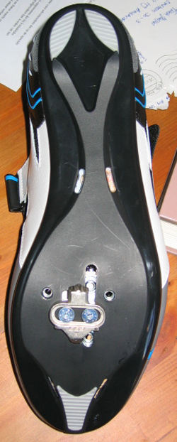 Zelf gemaakt.